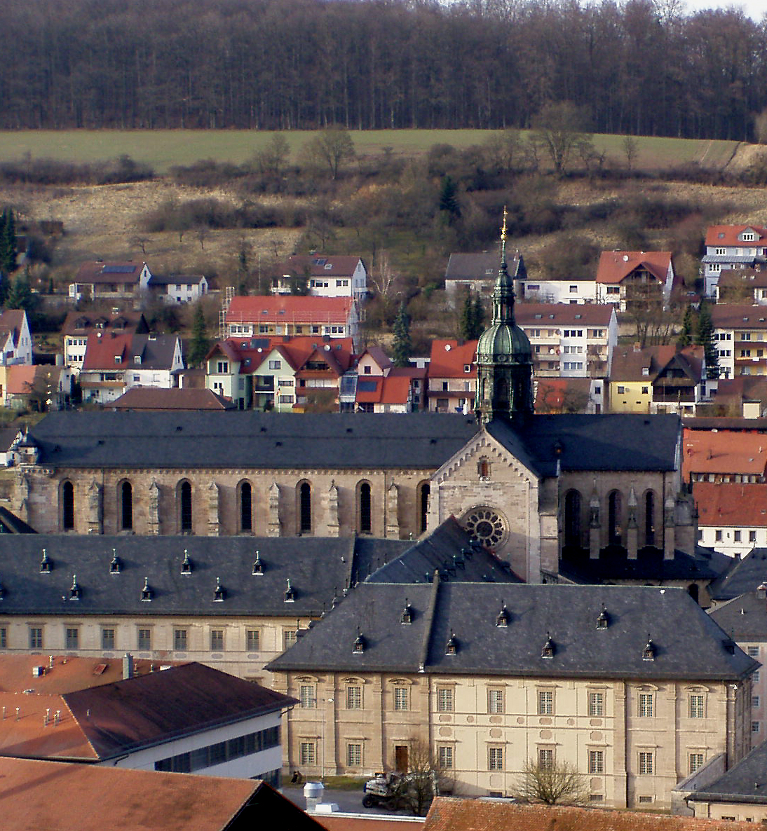 Ehemalige Klosteranlage mit Klosterkirche Ebrach/Oberfranken